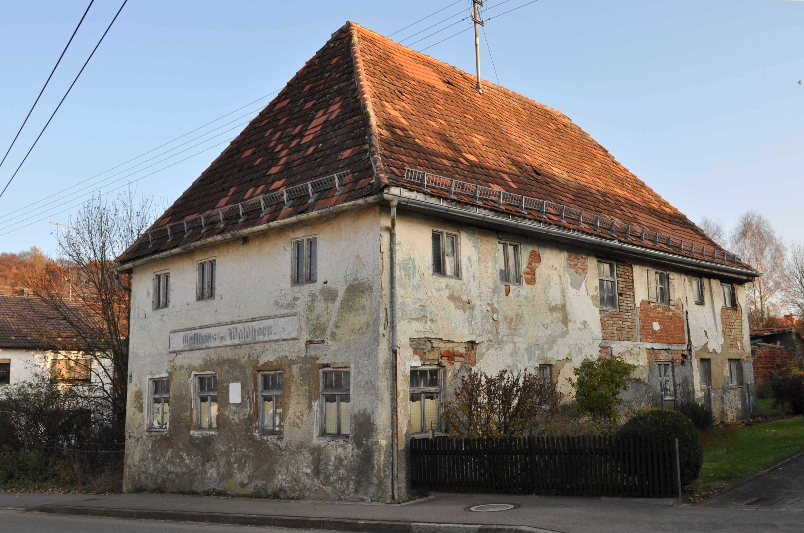 Ehemaliges Gasthaus Waldhorn, Walmdachbau, 18. Jh., Eichenhofen (Haldenwang), Bayern